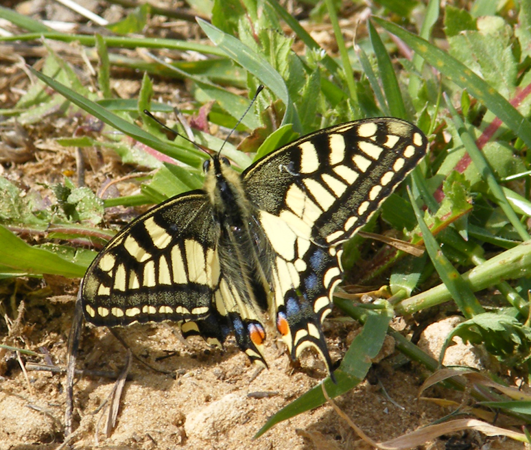 צולם ע"י עדו ארמיאץ בשדות באר יעקב